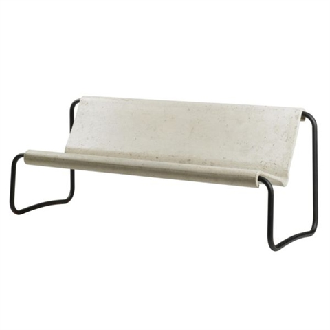 bench